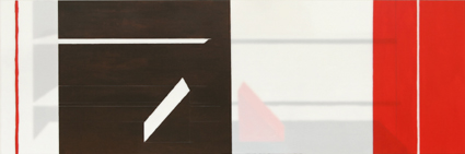 Peinture acrylique sur plexiglass; format 40x120 cm; oeuvre de Roland Schar, photo Jean-André Viala